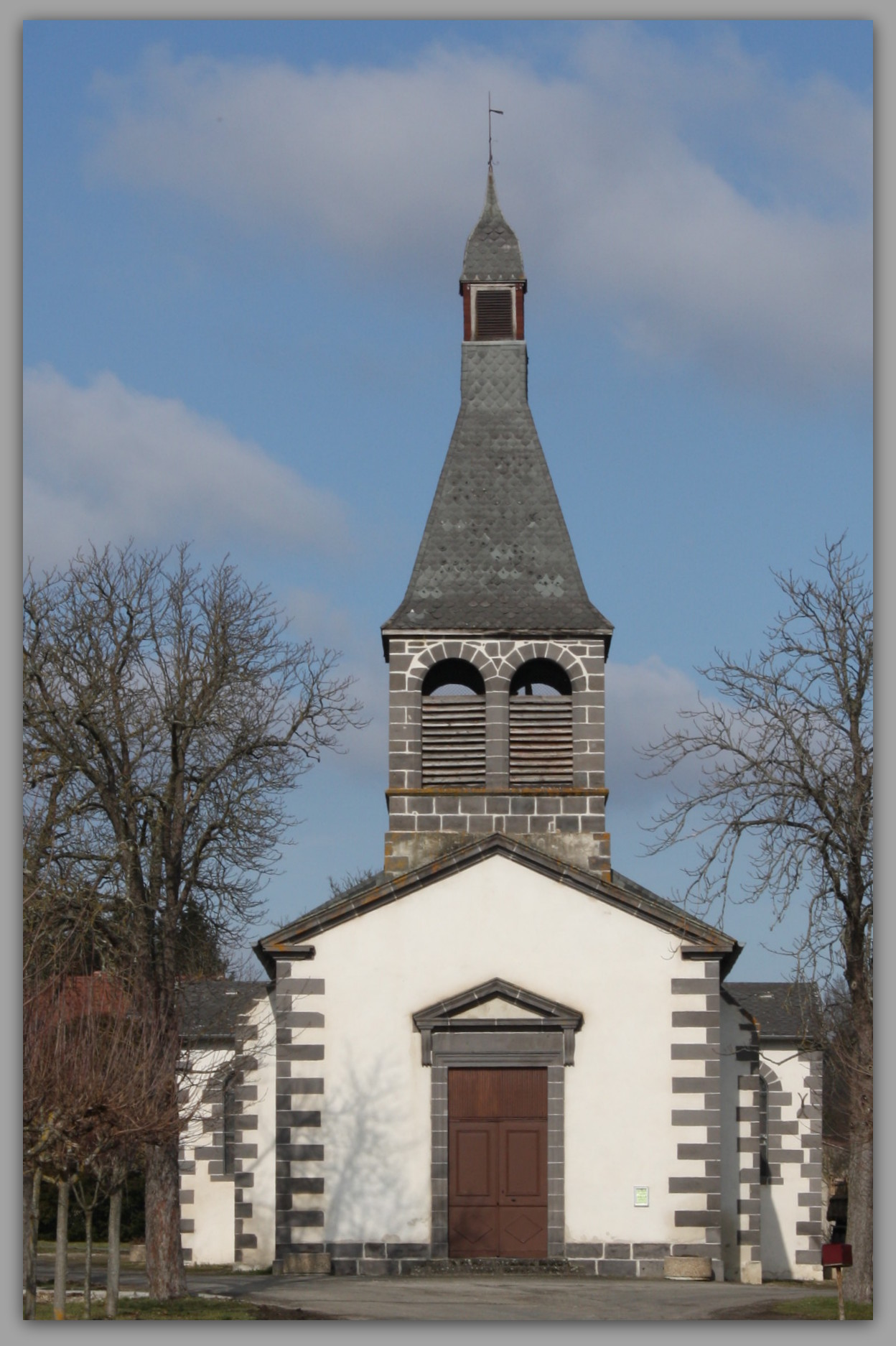 L'église